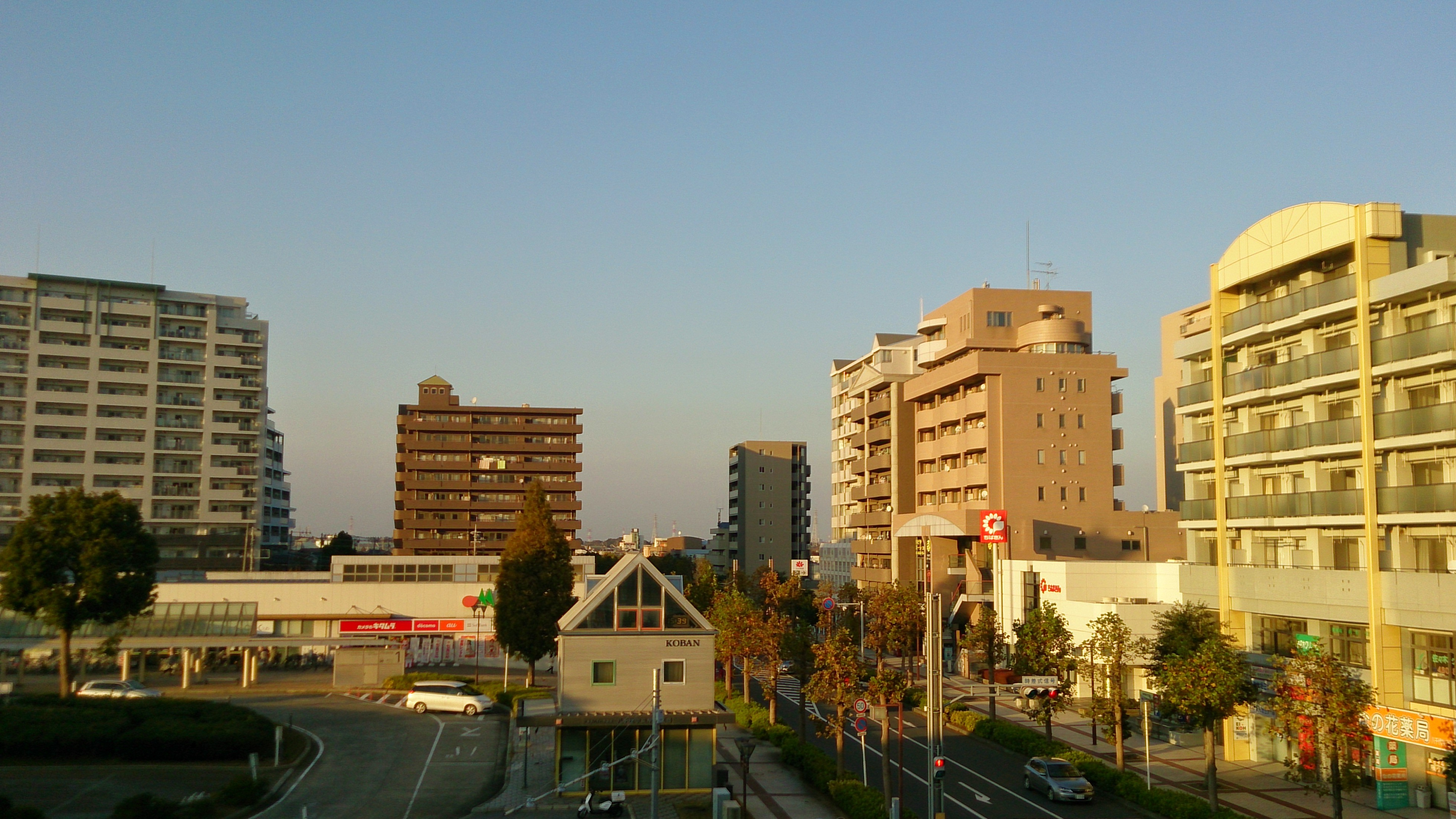 ゆりのき台を八千代中央駅ホームから望む